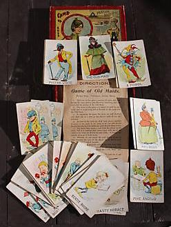 Old Maid card game